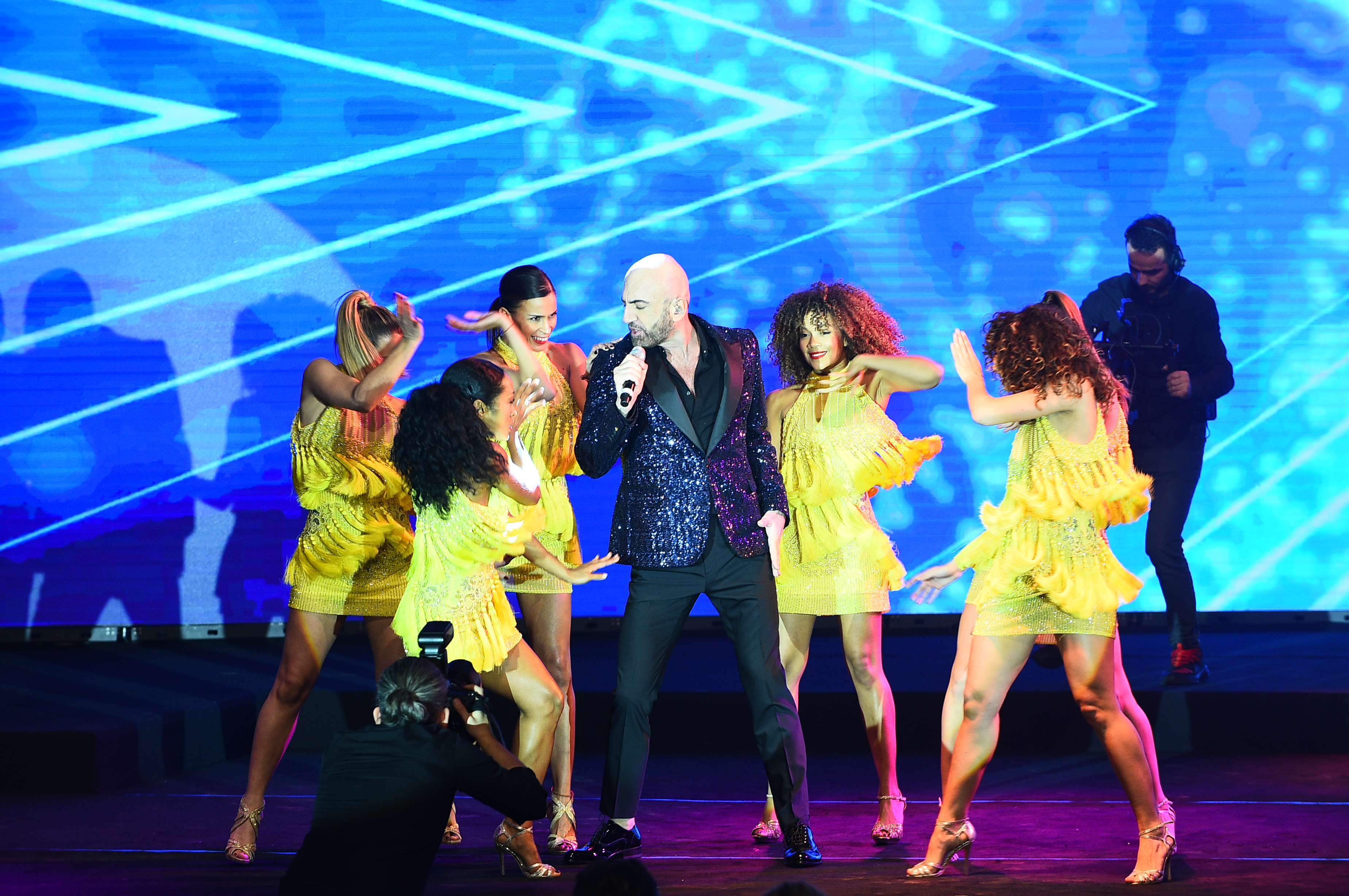 Serhat, Gecce Mekân Ödülleri 2018'de sahne alırken.